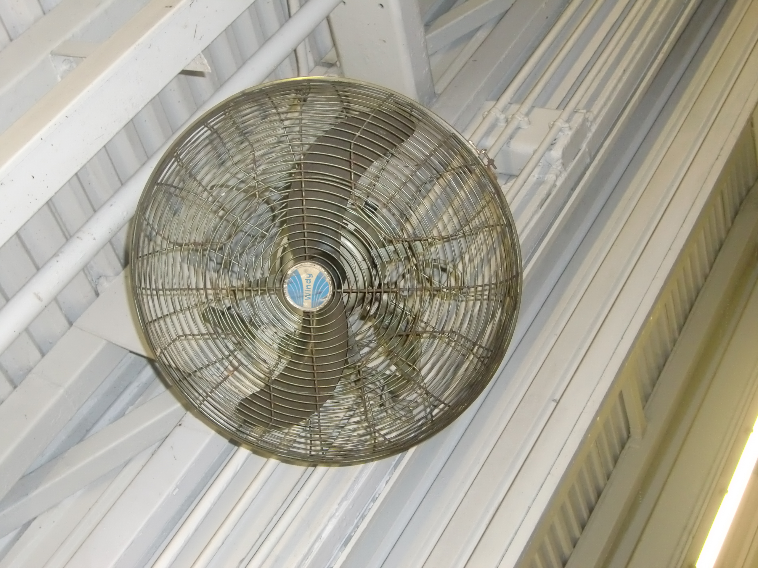 粵語: 牛角扇一把。大學站影。